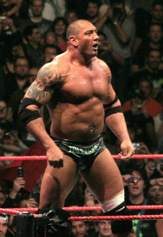 Recorte de la imagen 45 Batista.jpg de Andrea90.